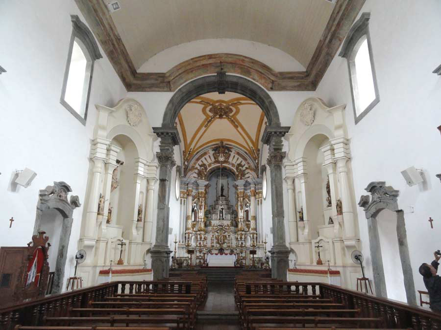 Igreja de Nossa Senhora do Carmo.